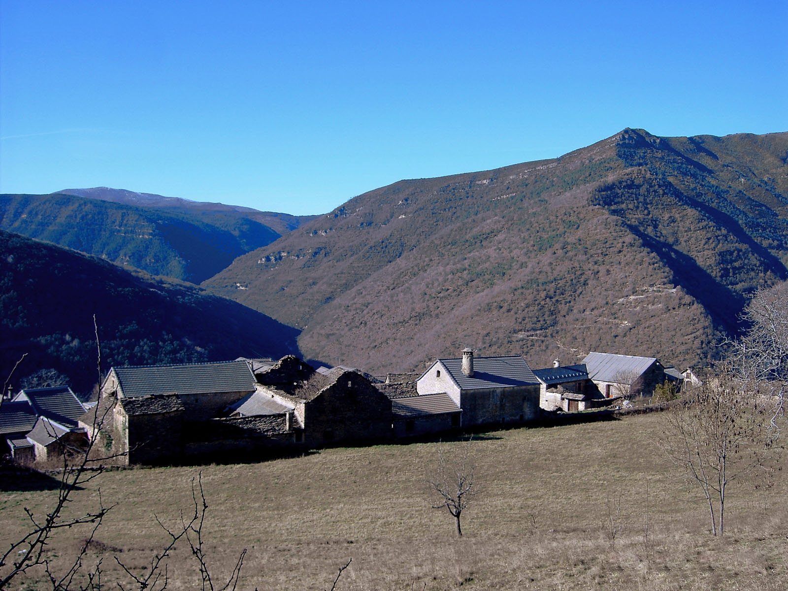 La localidad de Asín de Broto, a más de 1000m de altitud en el Pirineo de Huesca.